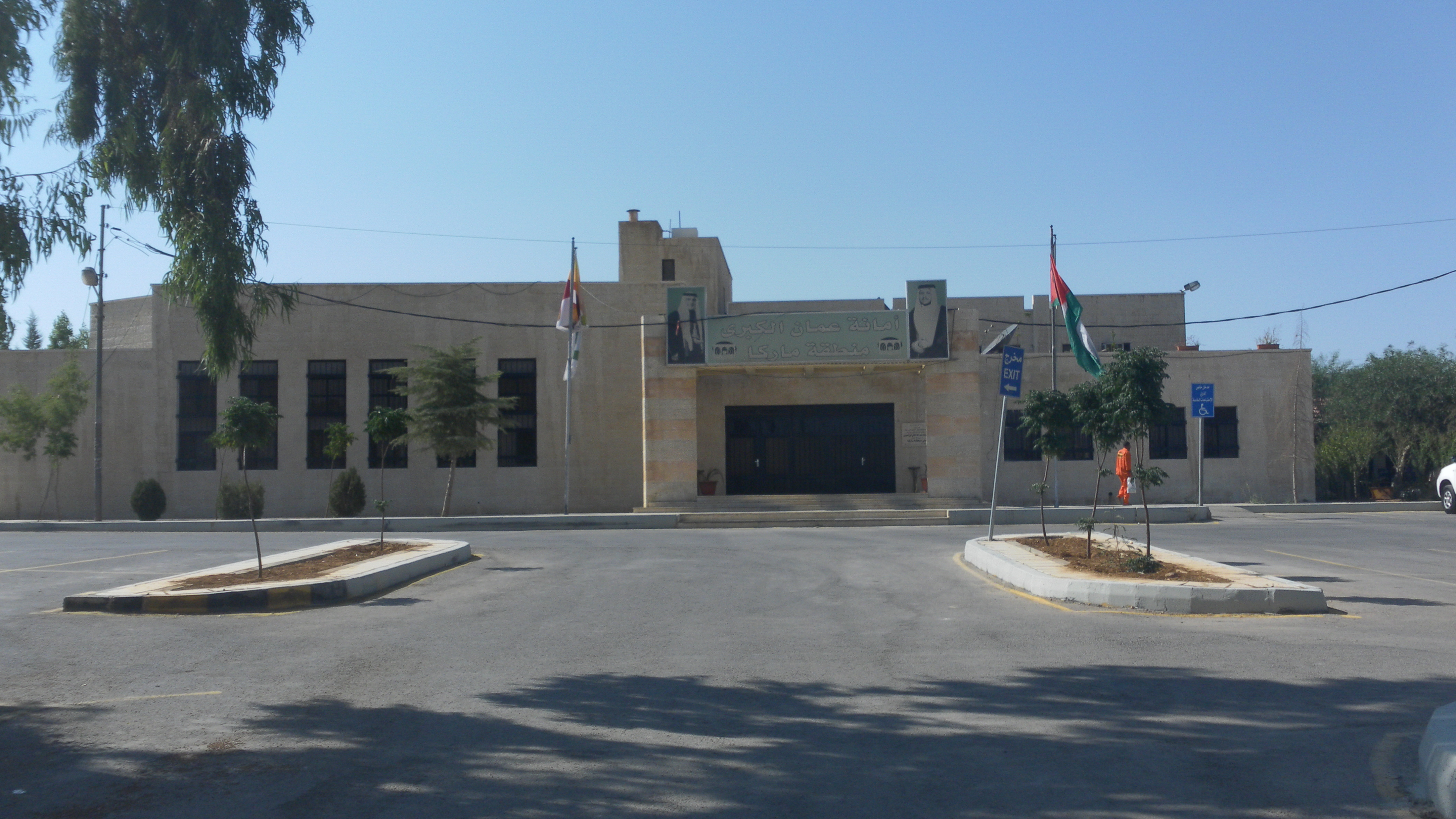 بلدية ماركا الشمالية, عمان، الأردن